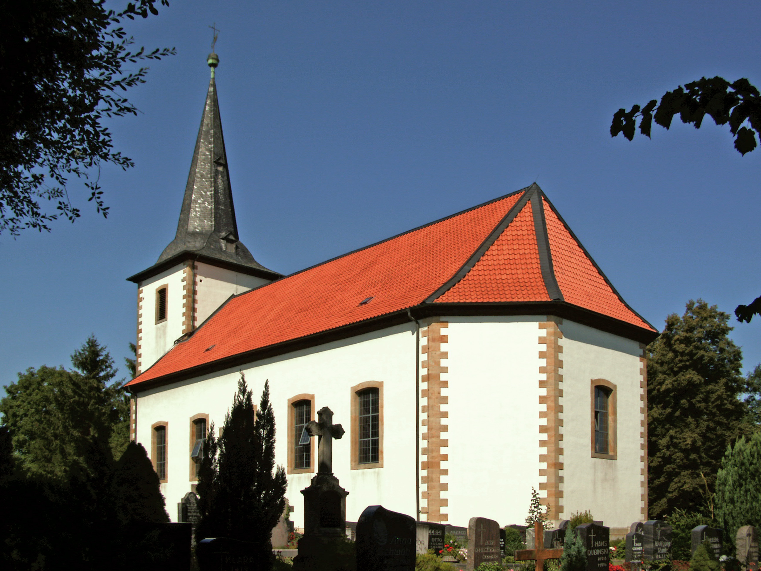 Katholische Kirche Maria Himmelfahrt in Steinbrück, Ortsteil von Söhlde, Landkreis Hildesheim